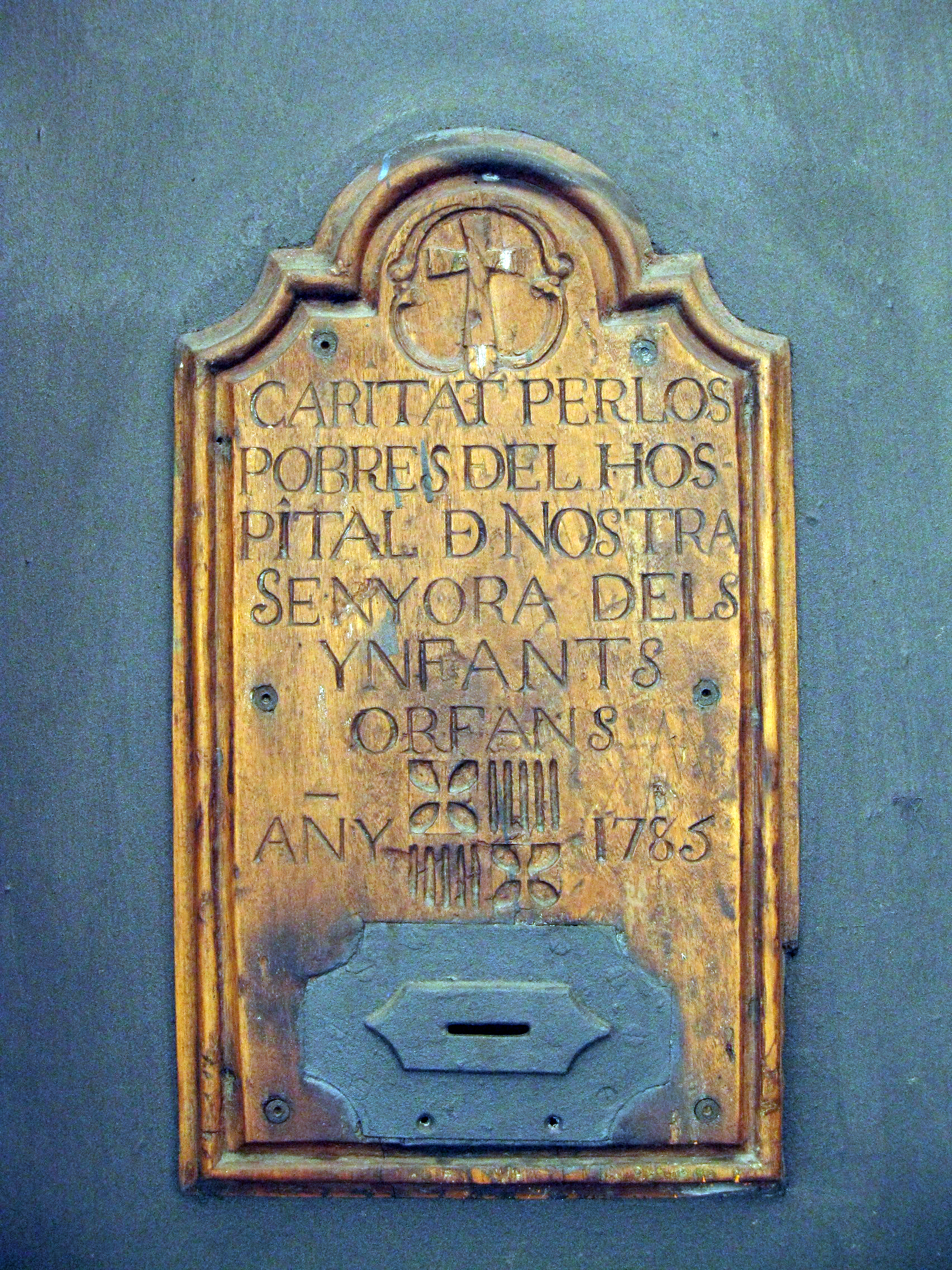 Antiga capella de la Casa dels Infants Orfes (1680), a la cantonada del carrers Elisabets amb la plaça dels Àngels, al Raval de Barcelona. Actualment acull una de les dependències del CIDOB. A la imatge, almoiner a la porta d'entrada.